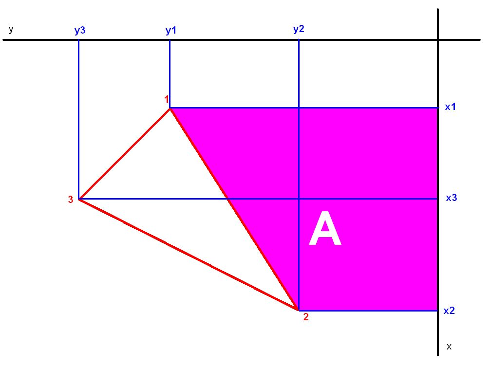 Výpočet plochy pomocí L´Huillierových vzorců - Plocha A